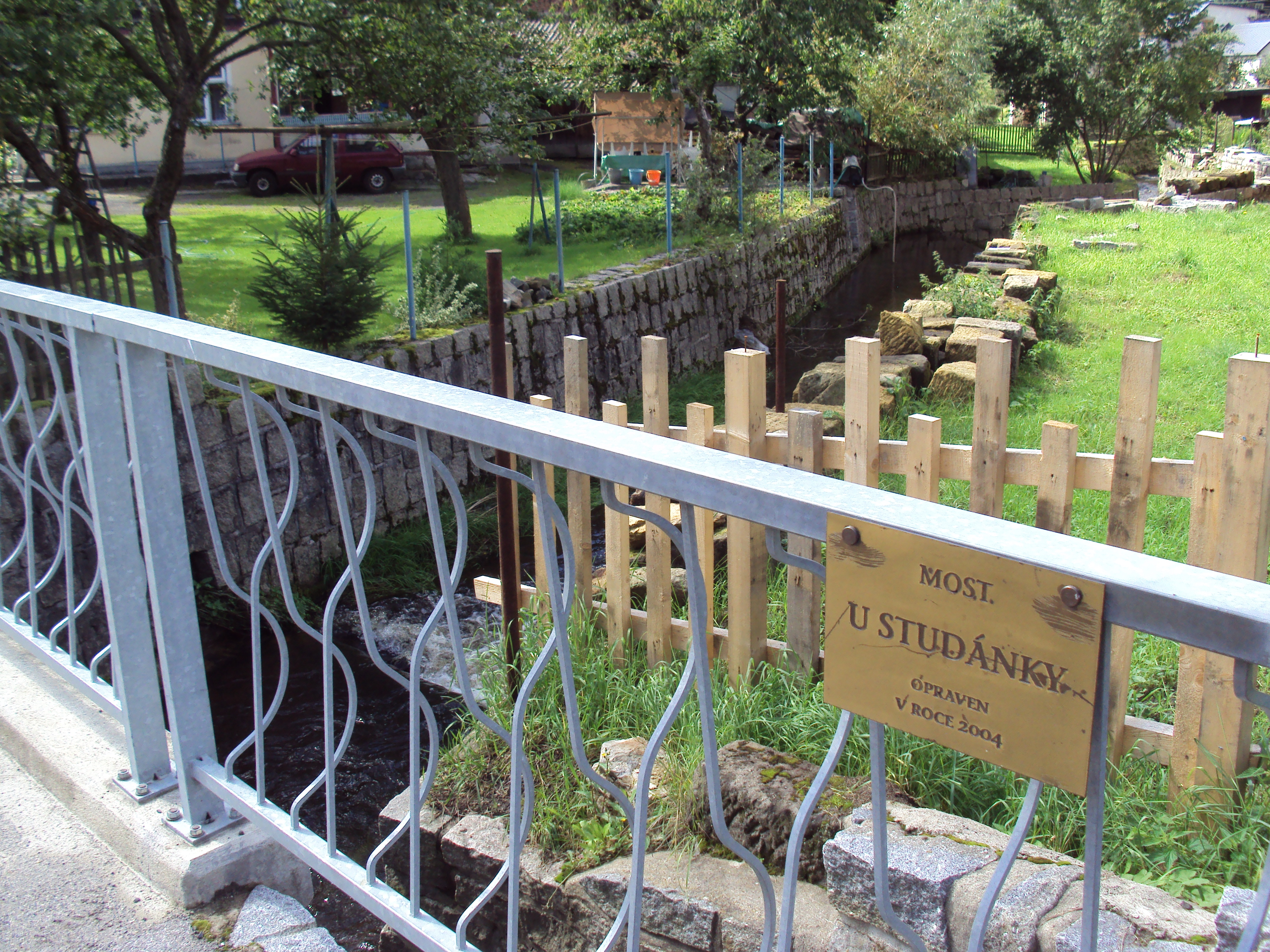 Most u studánky přes Dobranovský potok v obci Sloup v Čechách